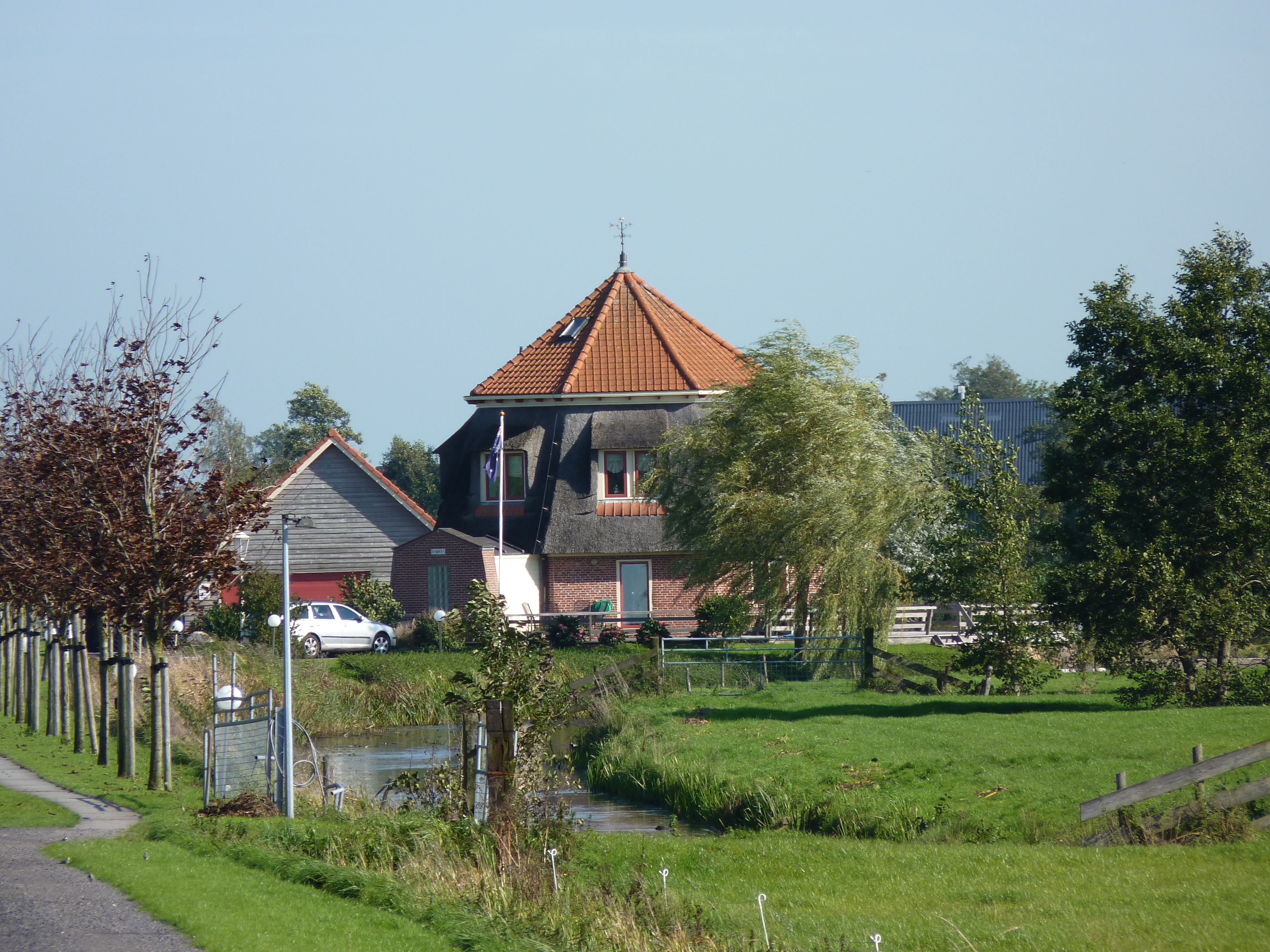 Doezum Bombay Molenwoning